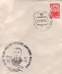 1962. 90 лет со дня рождения Курако (спецгашение)